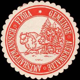 Sealing stamp Title: Gemeinde Auerswalde Amtshauptmannschaft Flöha Description: rot, weiß, geprägt Place: Auerswalde size: 4 cm